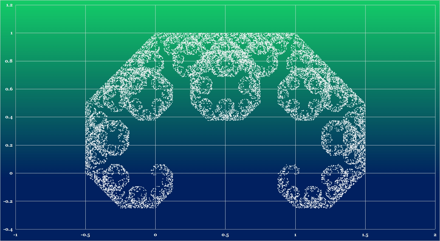 表計算ソフトにより計算し、グラフ化したレヴィC曲線